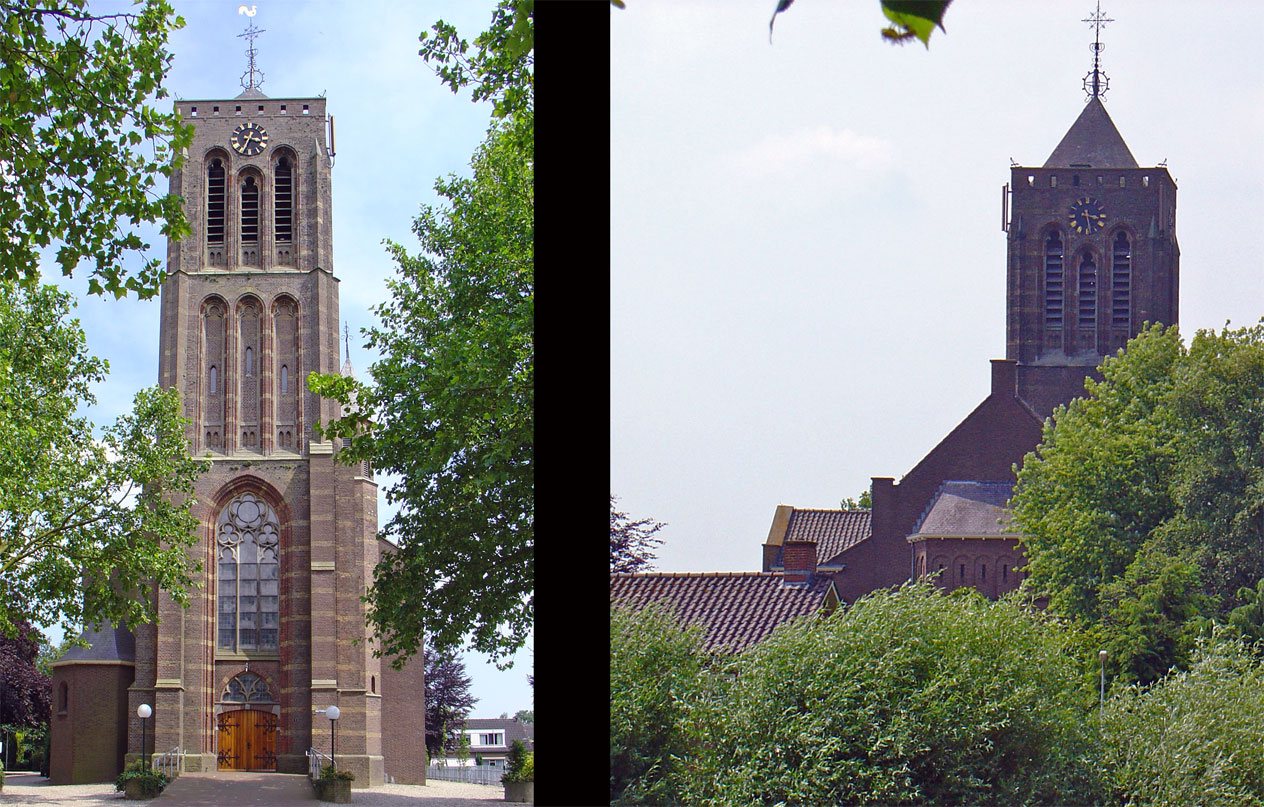 Mattheuskerk van Azewijn